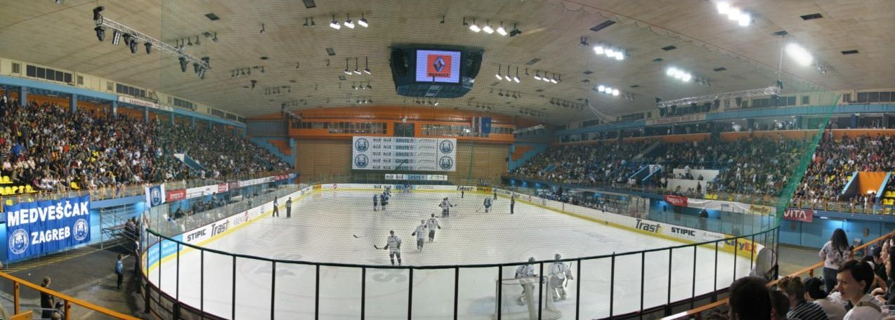 Dom sportova KHL Medveščak vs. Alba Volan, 11.10.2009.